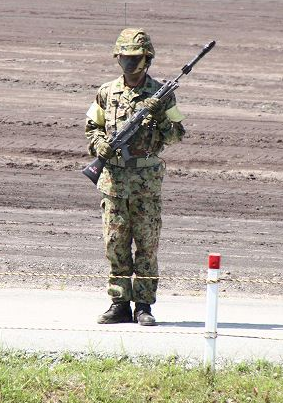 2010-度富士総合火力演習にて06式小銃てき弾の展示の様子（カメラで撮影した画像を拡大編集）